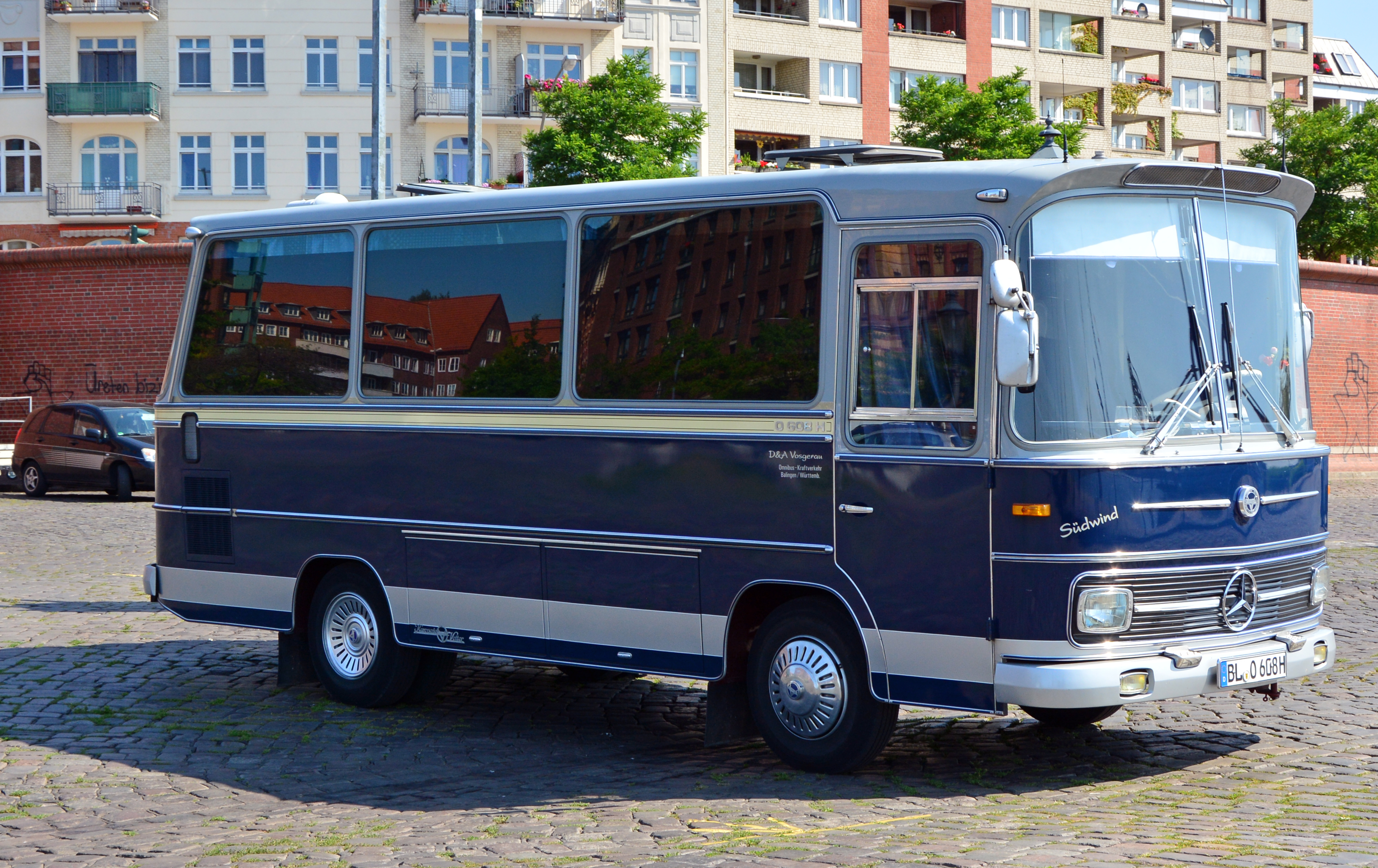 Mercedes-Benz O 608 H mit Vetter Aufbau auf dem Altonaer Fischmarkt.